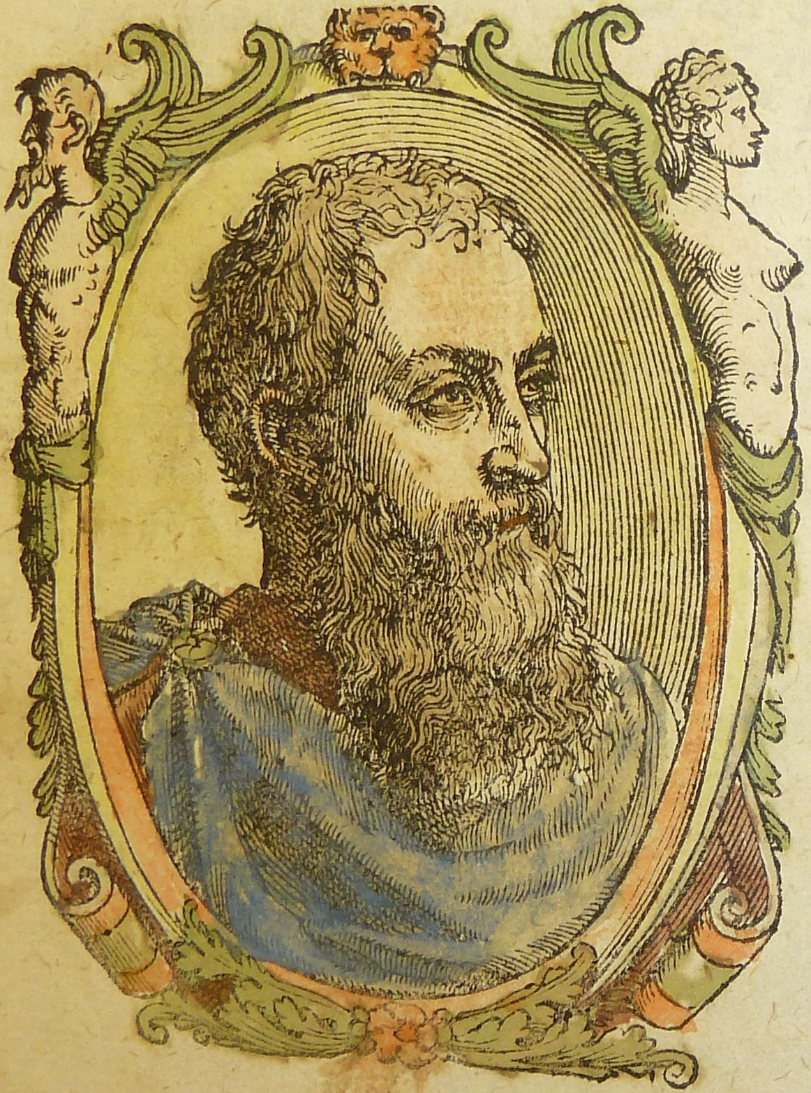 Immagine di Francesco Tatti nome d'arte di Francesco Sansovino in Detti et fatti di Carlo Quinto imperatore.